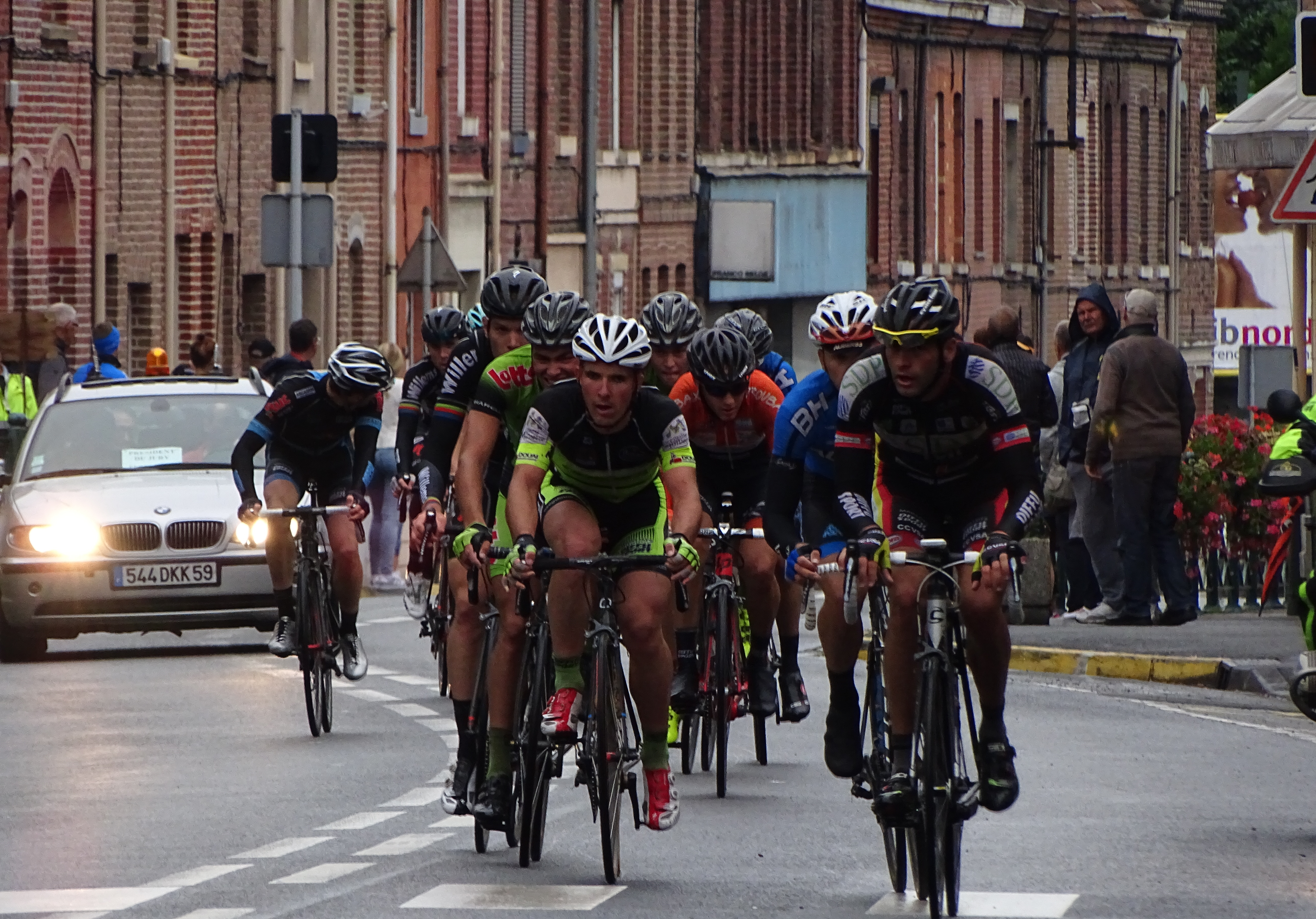 Reportage réalisé le dimanche 26 juillet à l'occasion du départ et de l'arrivée du Grand Prix de la ville de Pérenchies 2015 à Pérenchies, Nord, Nord-Pas-de-Calais, France.